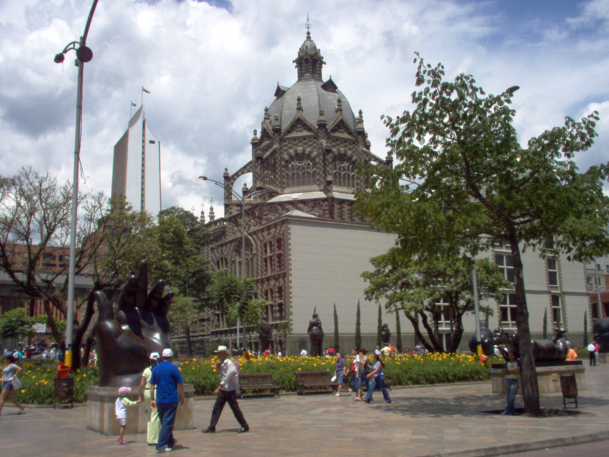 Plaza de Botero al fondo Palacio de la Cultura Rafael Uribe Uribe